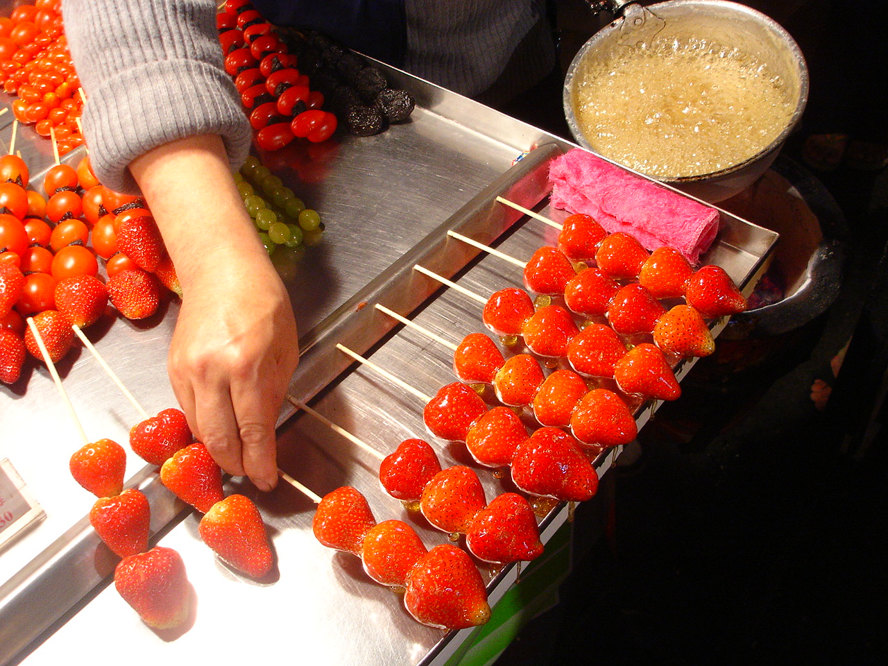 自行拍攝